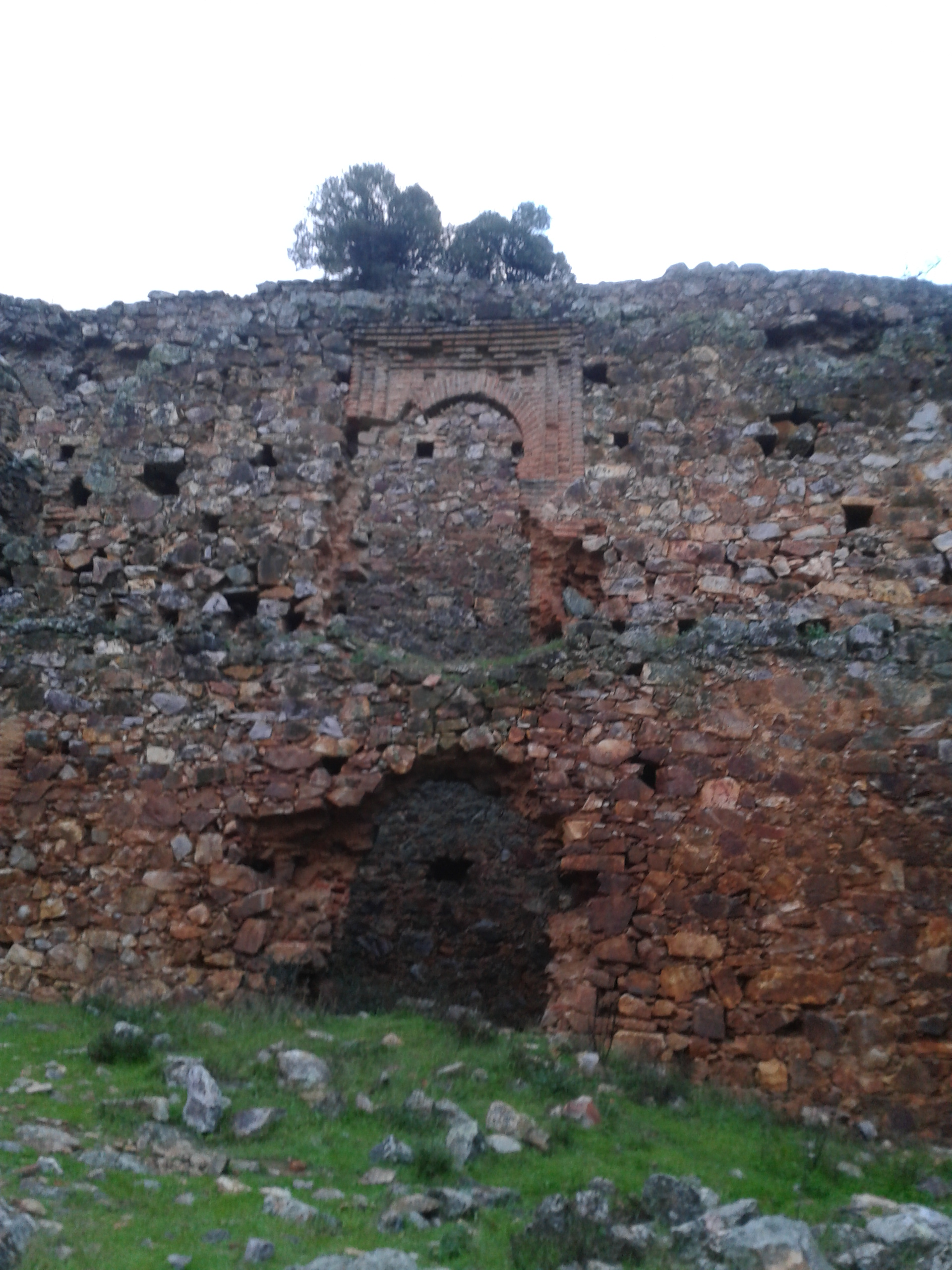 Zona palaciega del castillo de Herrera del Duque